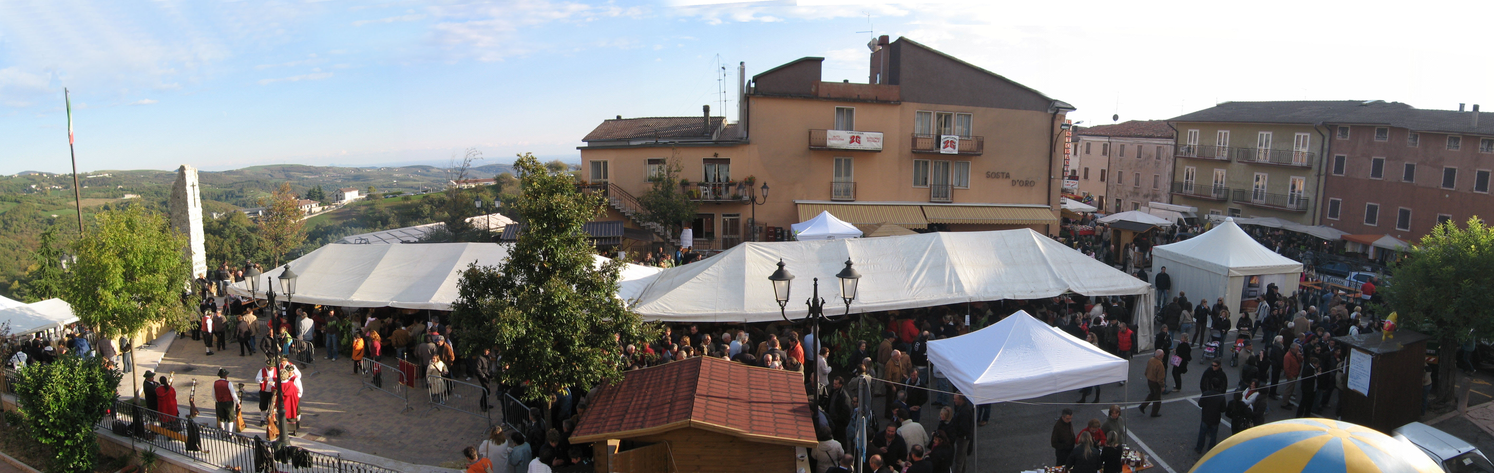 Sagra dei Maroni 2007 - San Rocco di Piegara